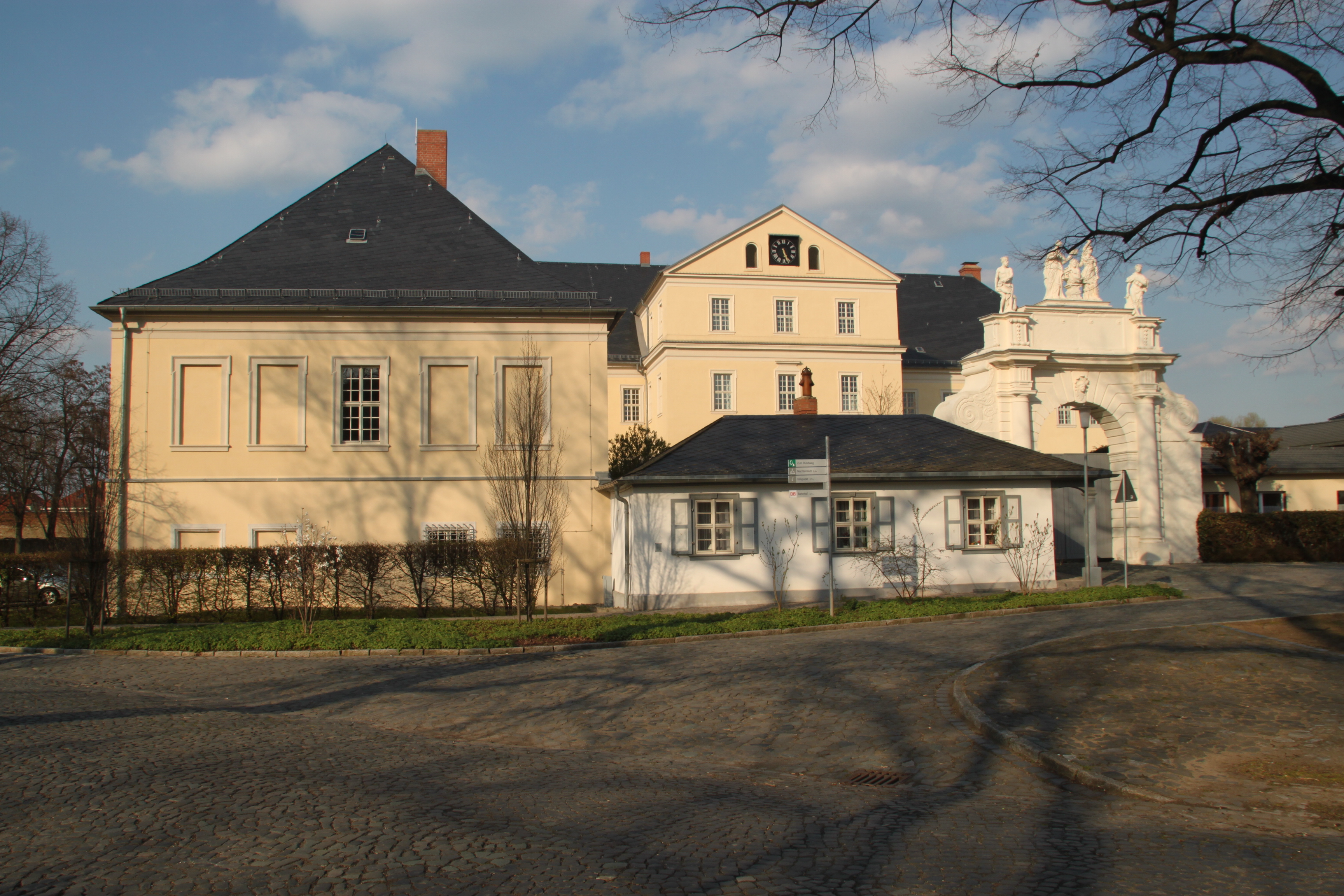 Seeland-Hoym, Schloss